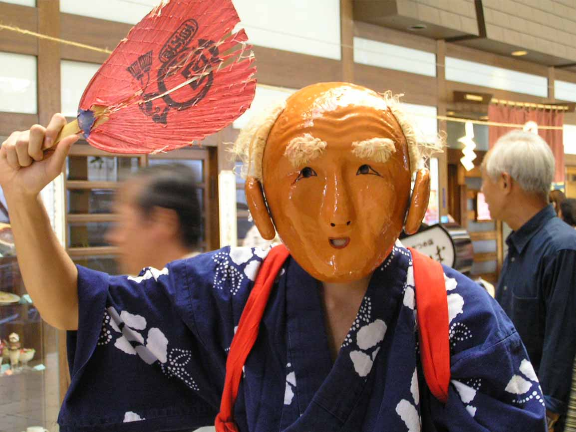 suinkyo